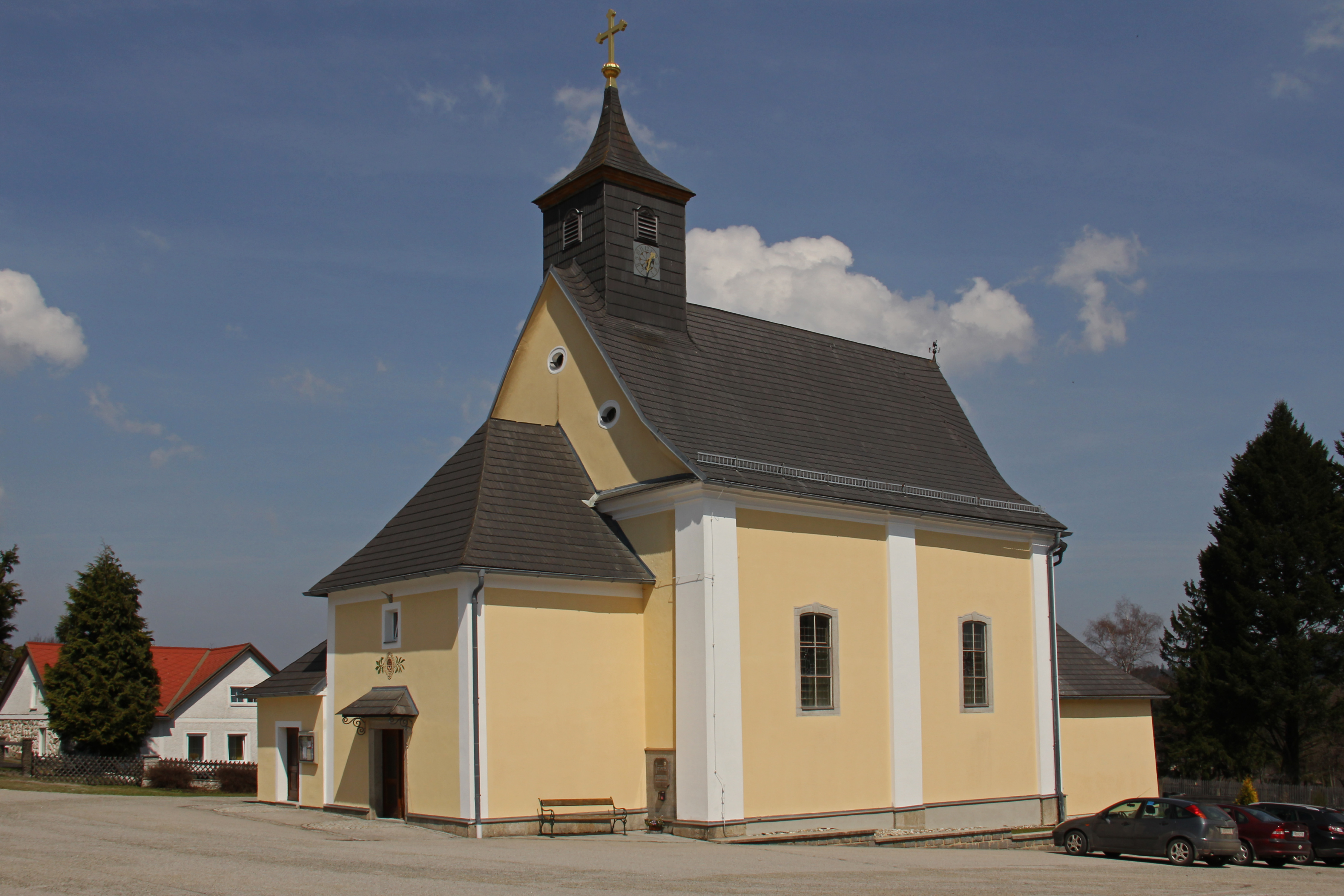 Die spätbarocke Pfarrkirche wurde von 1772 bis 1775 erbaut. Sie besitzt barocke Schnitzfiguren und einen Neorenaissance-Altar.